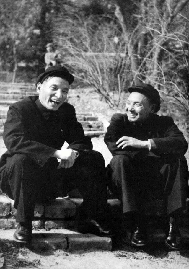 1952年陈云和邓小平在颐和园。